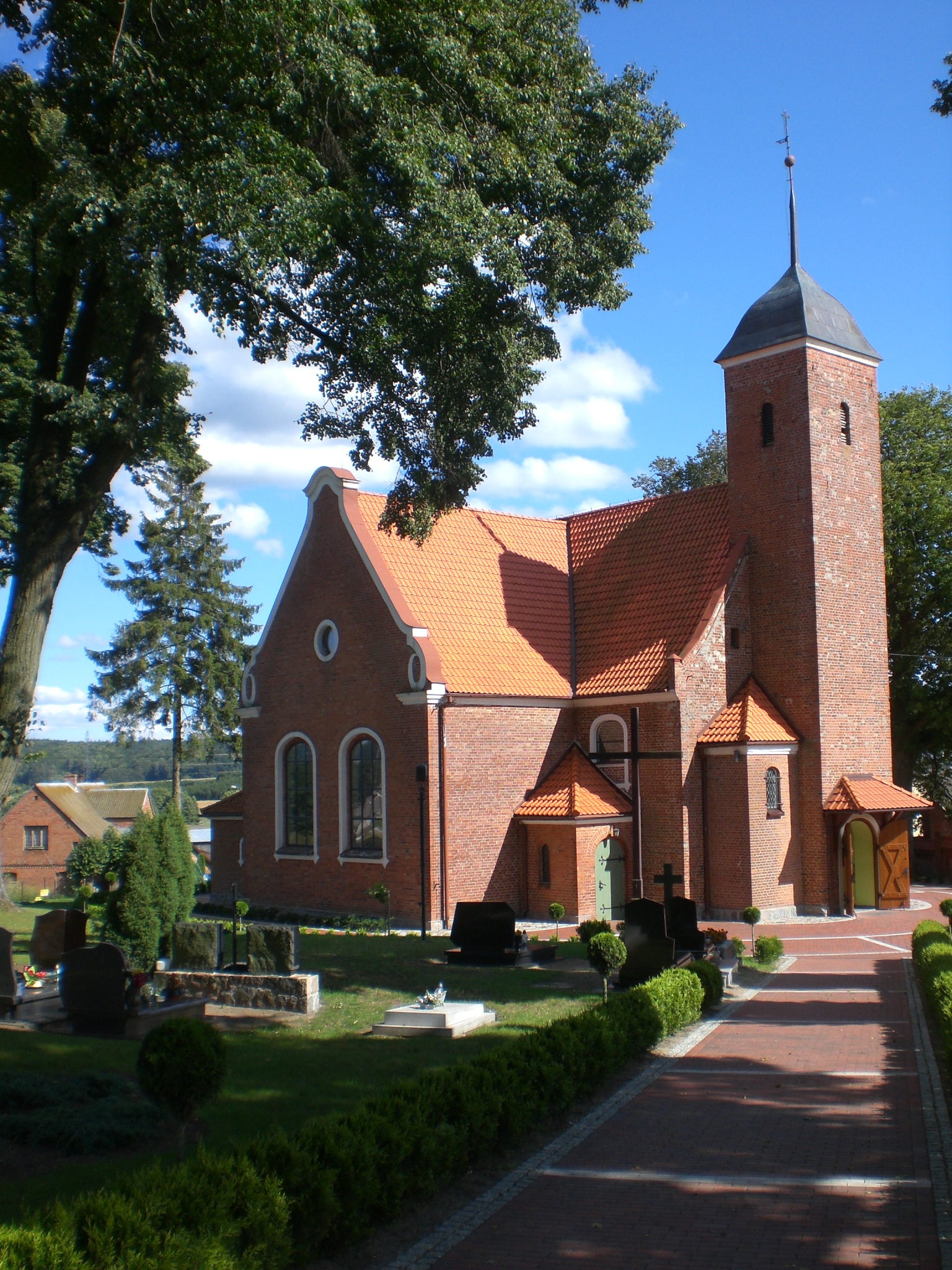 Goręczyno - rzymskokatolicki kościół parafialny p.w. Świętej Trójcy i Wszystkich Świętych